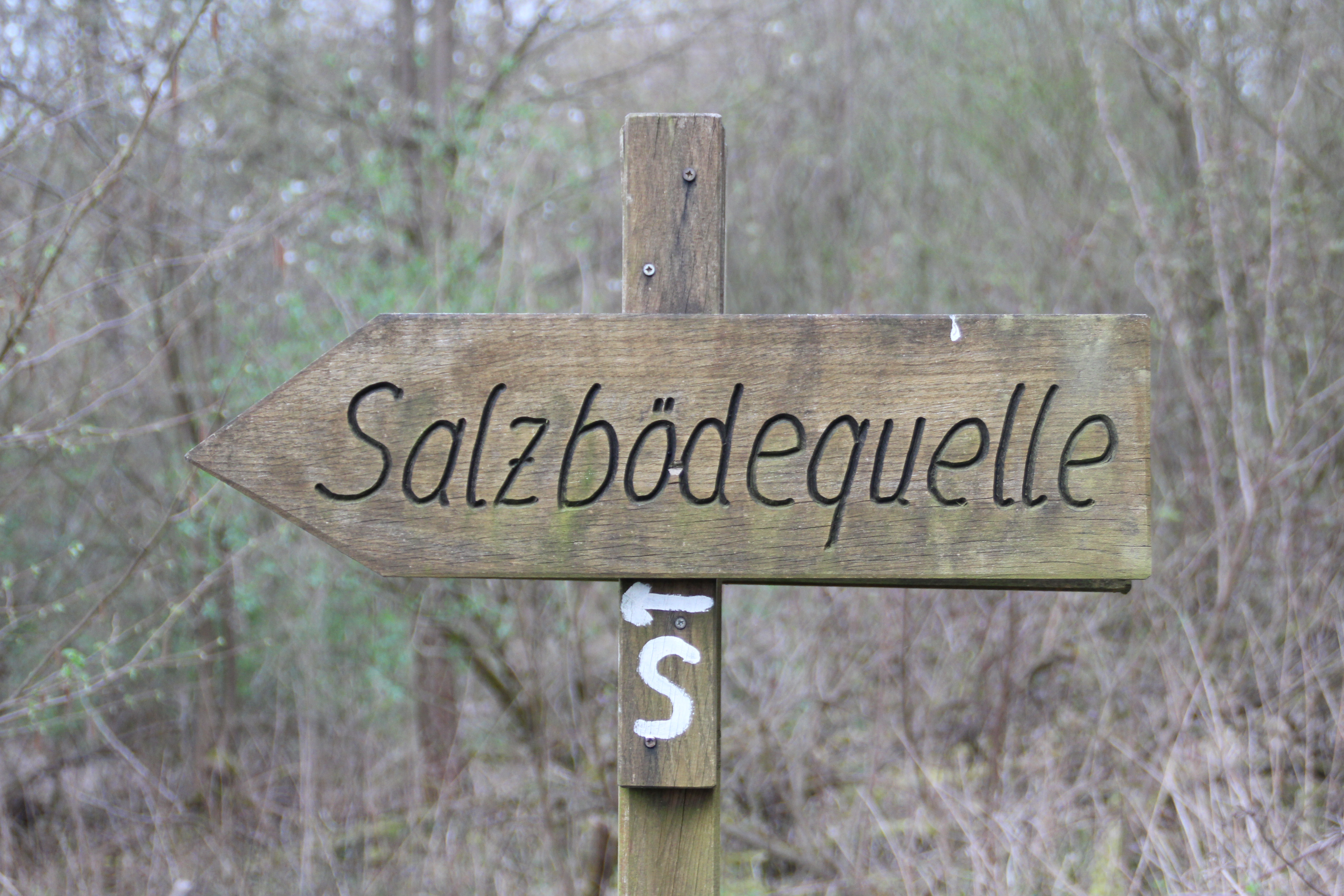 Salzbödequelle